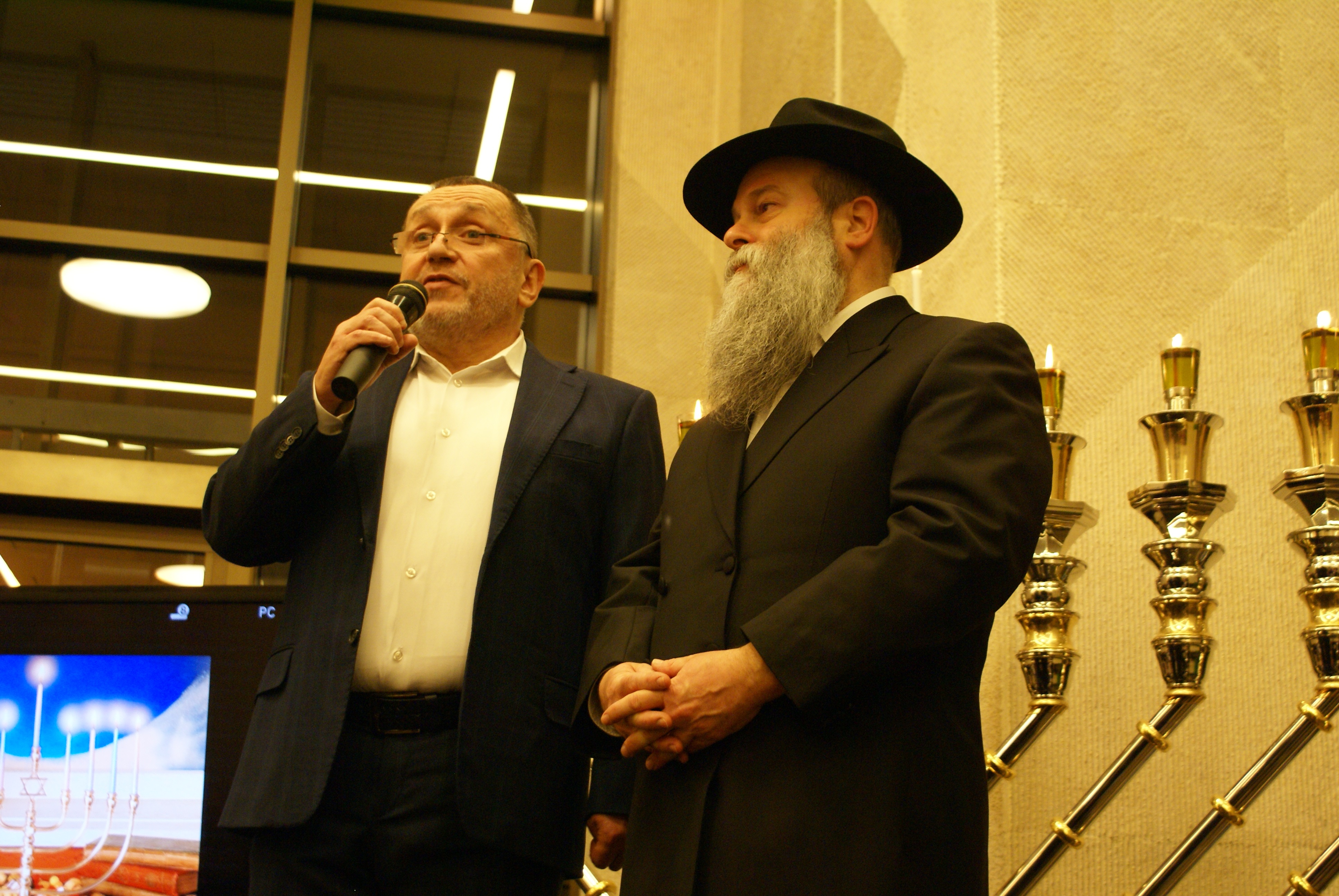 Главный раввин Днепра Шмуэль Каминецкий и руководитель ОЕОУ Михаэль Ткач